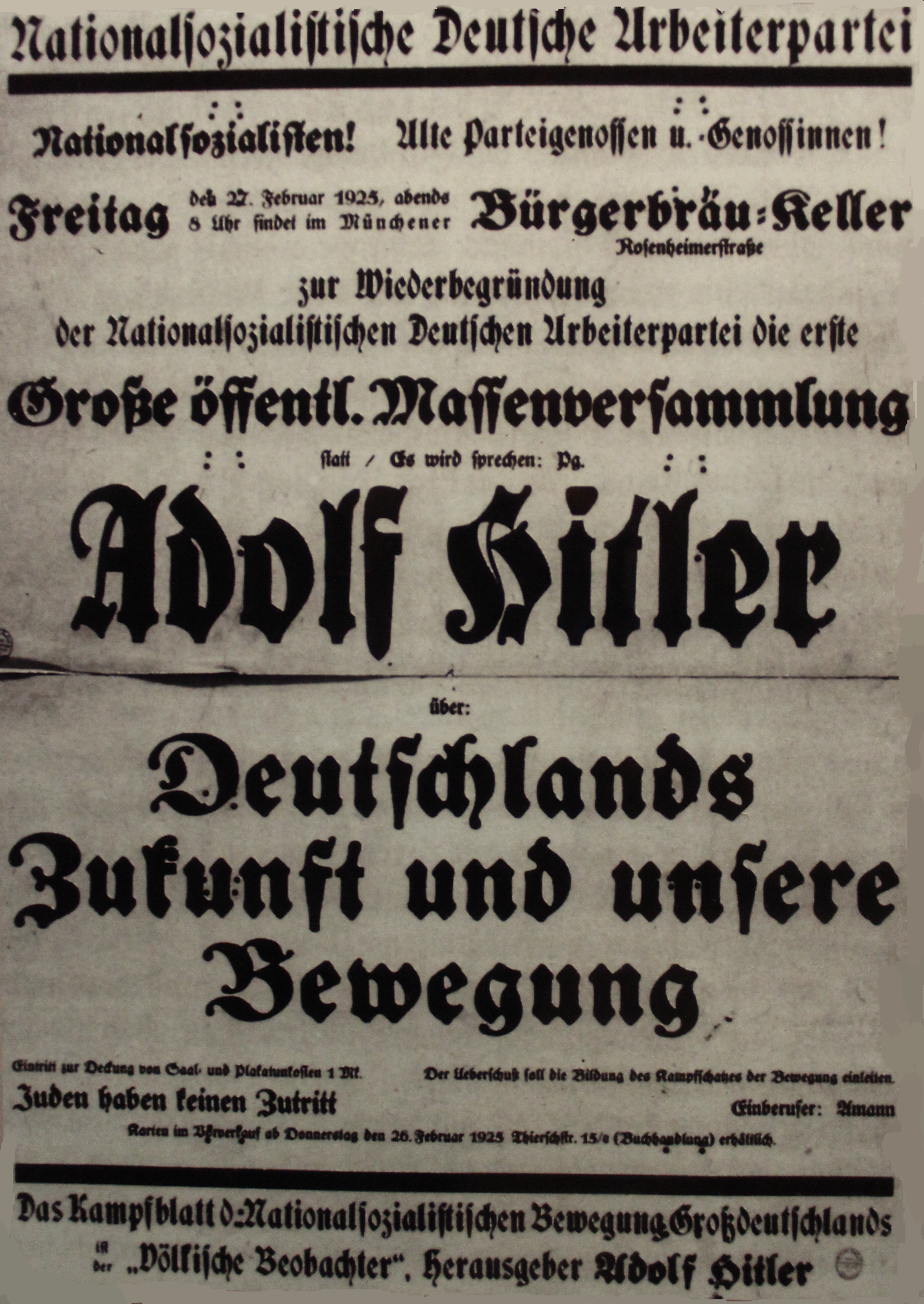 Einladung zur eine "Wiederbegründung" der NSDAP mit Adolf Hitler als Redner, 27. April 1925, München, Bürgerbräukeller. Ränder des Plakates geringfügig elektronisch restauriert.